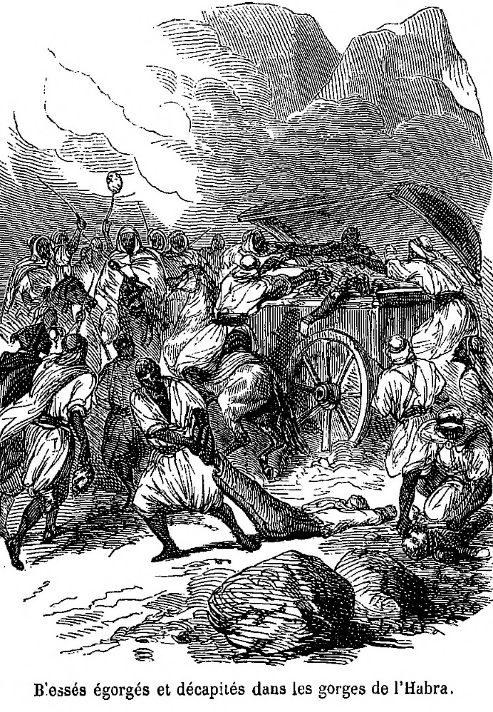 Gorges de l'Habra, blessés égorgés, 28 juin 1835. Combat perdu par le général Trézel, le 28 juin 1835, à la Macta (Algérie).